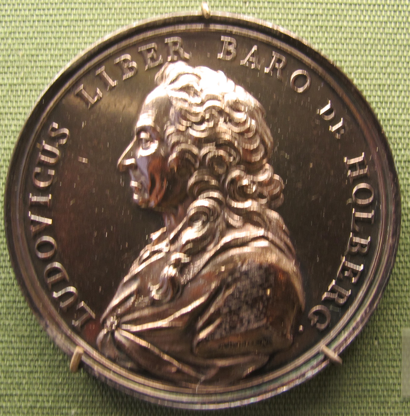 Ludvig Holberg, arg, 1756